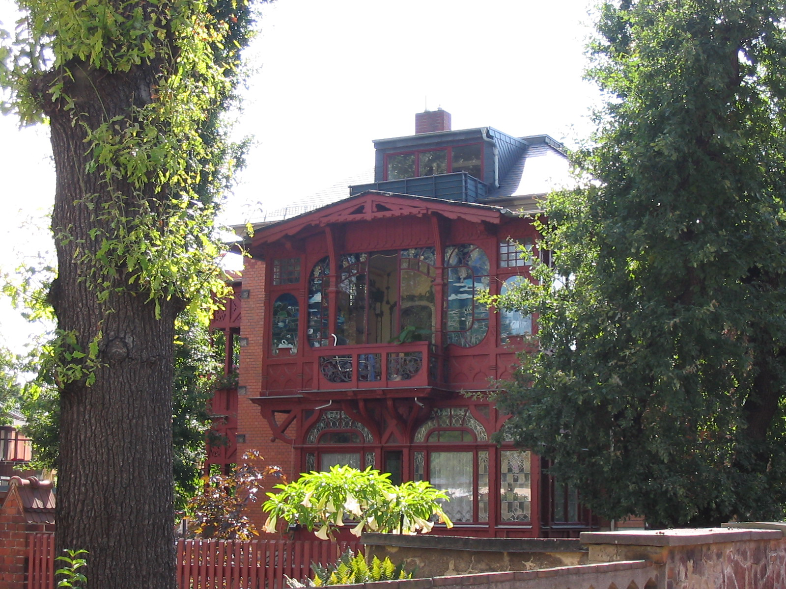 Villa Marianne in Radebeul, Rückseite